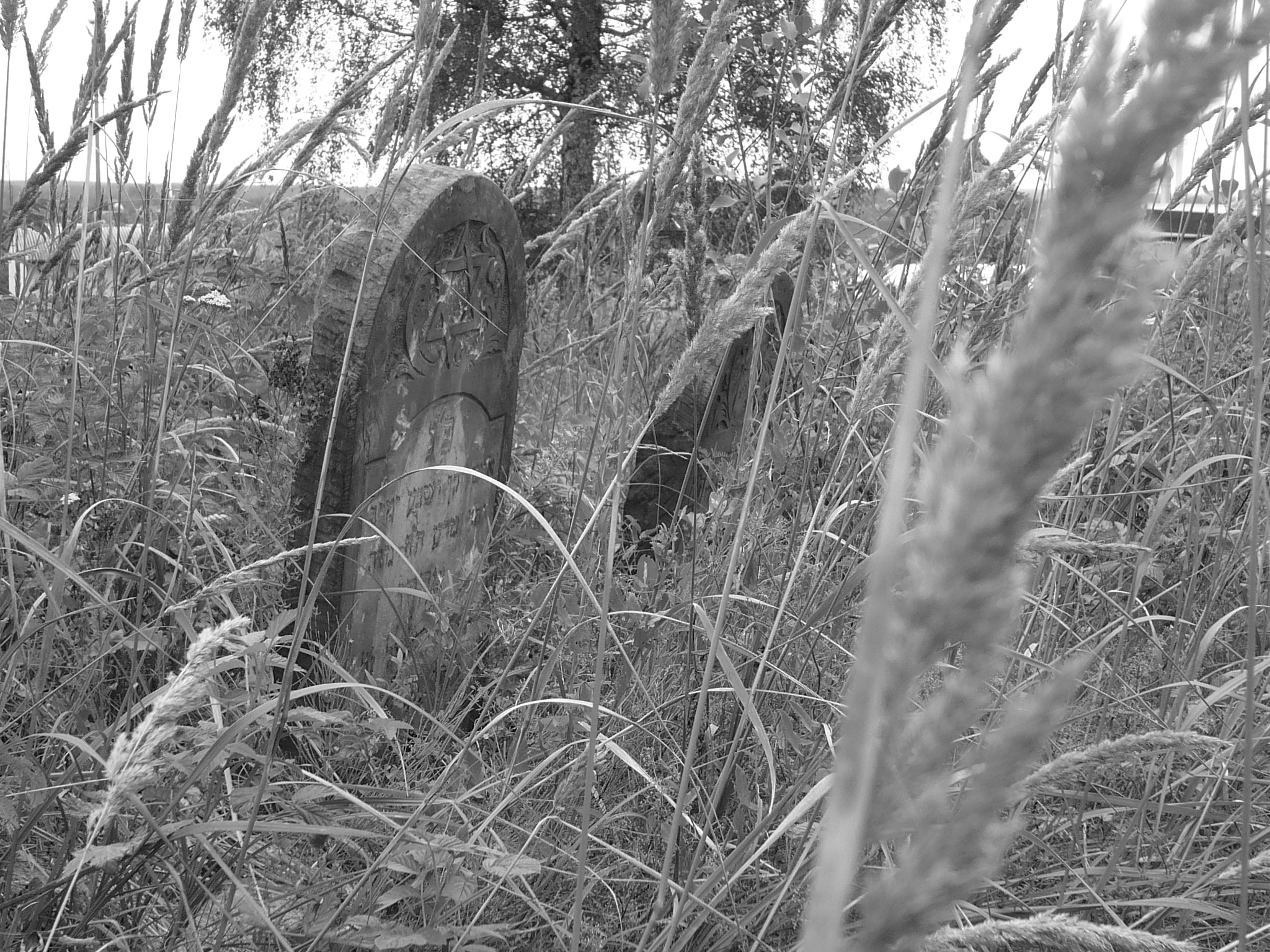 Macewy na cmentarzu żydowskim w Radomsku